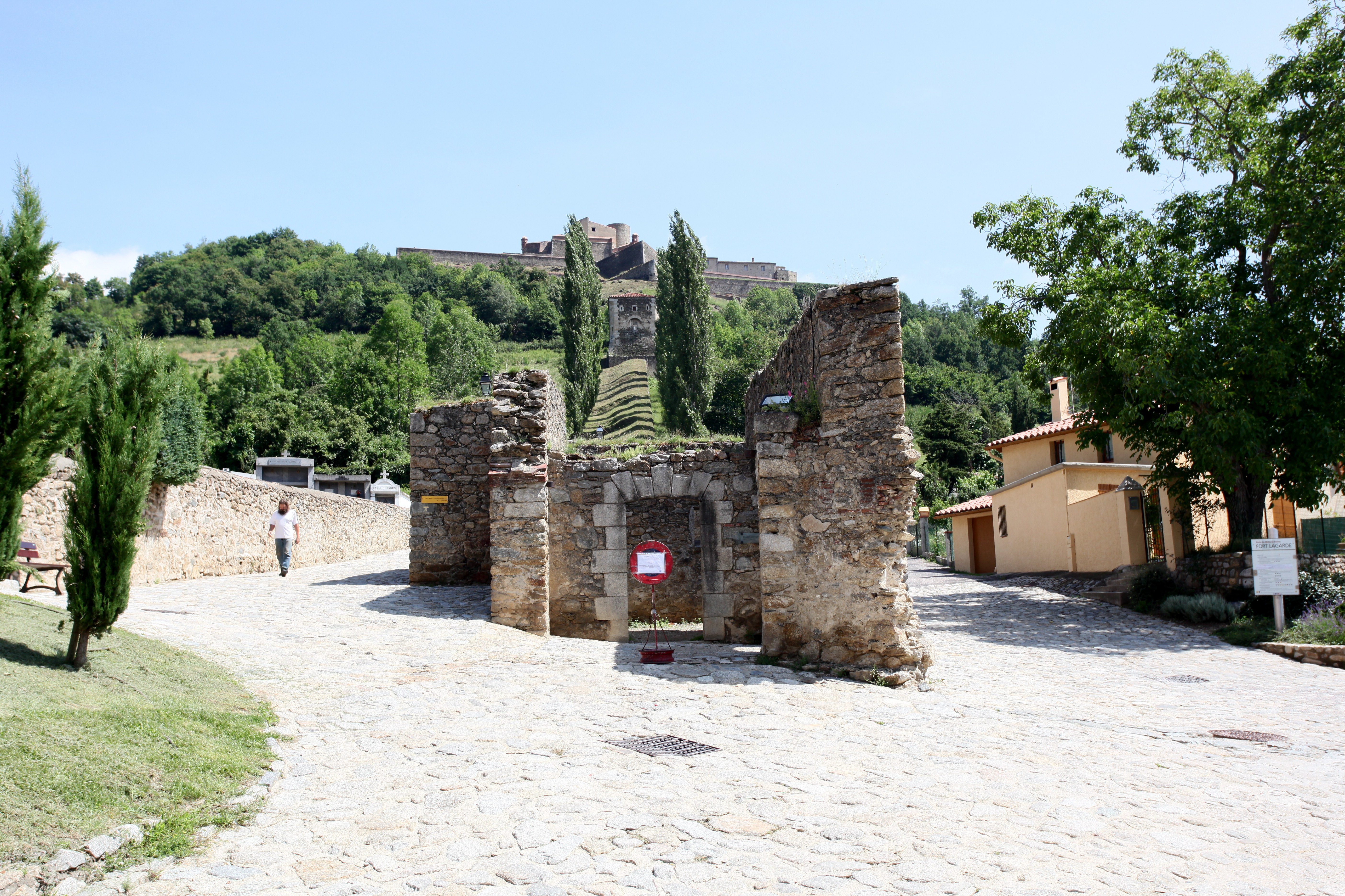 Chemin couvert menant de la ville au fort Lagarde (Prats de Mollo, 66, France)